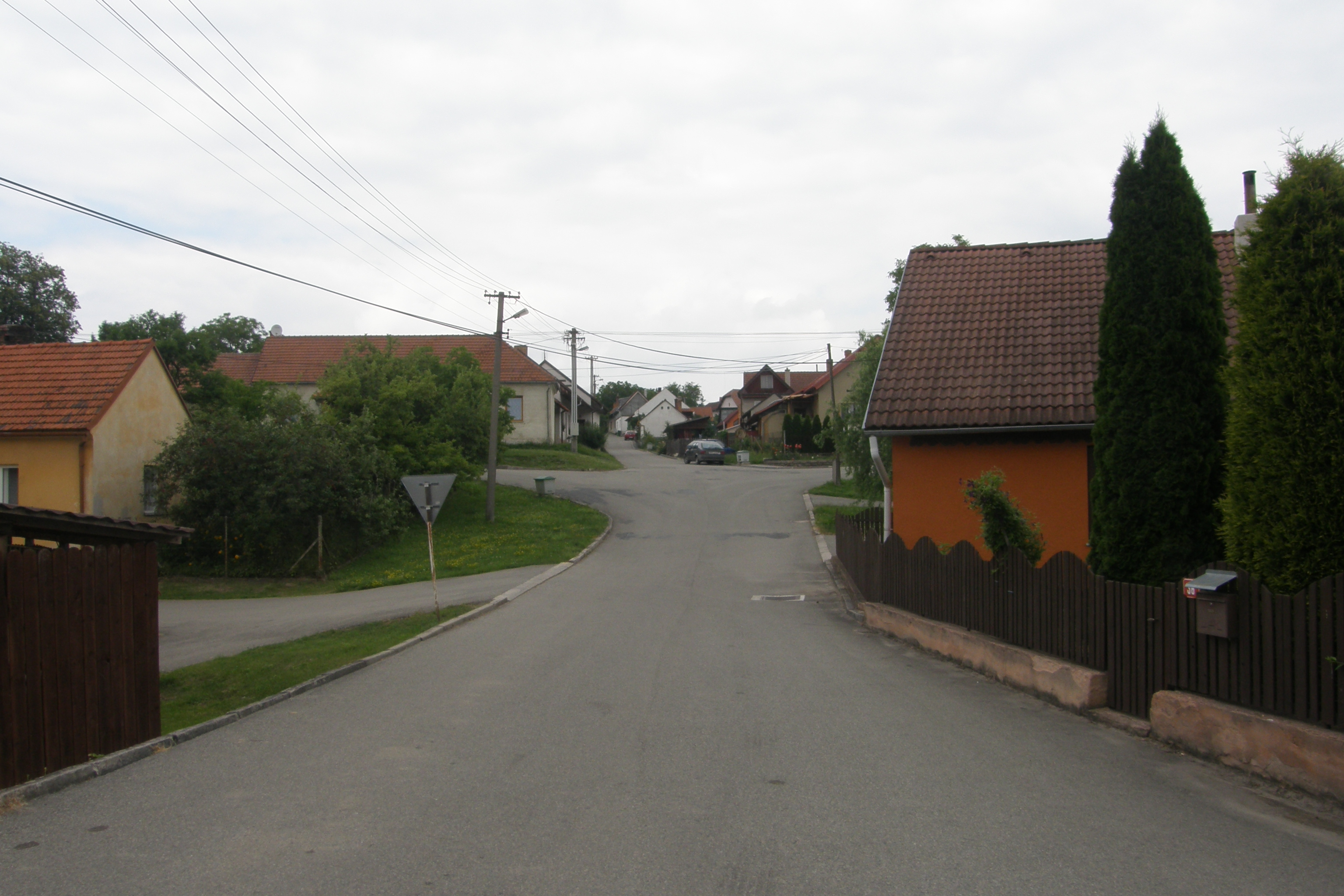 Voděrady; severní část obce